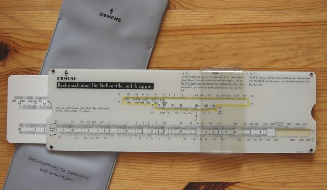 aus Kunststoff